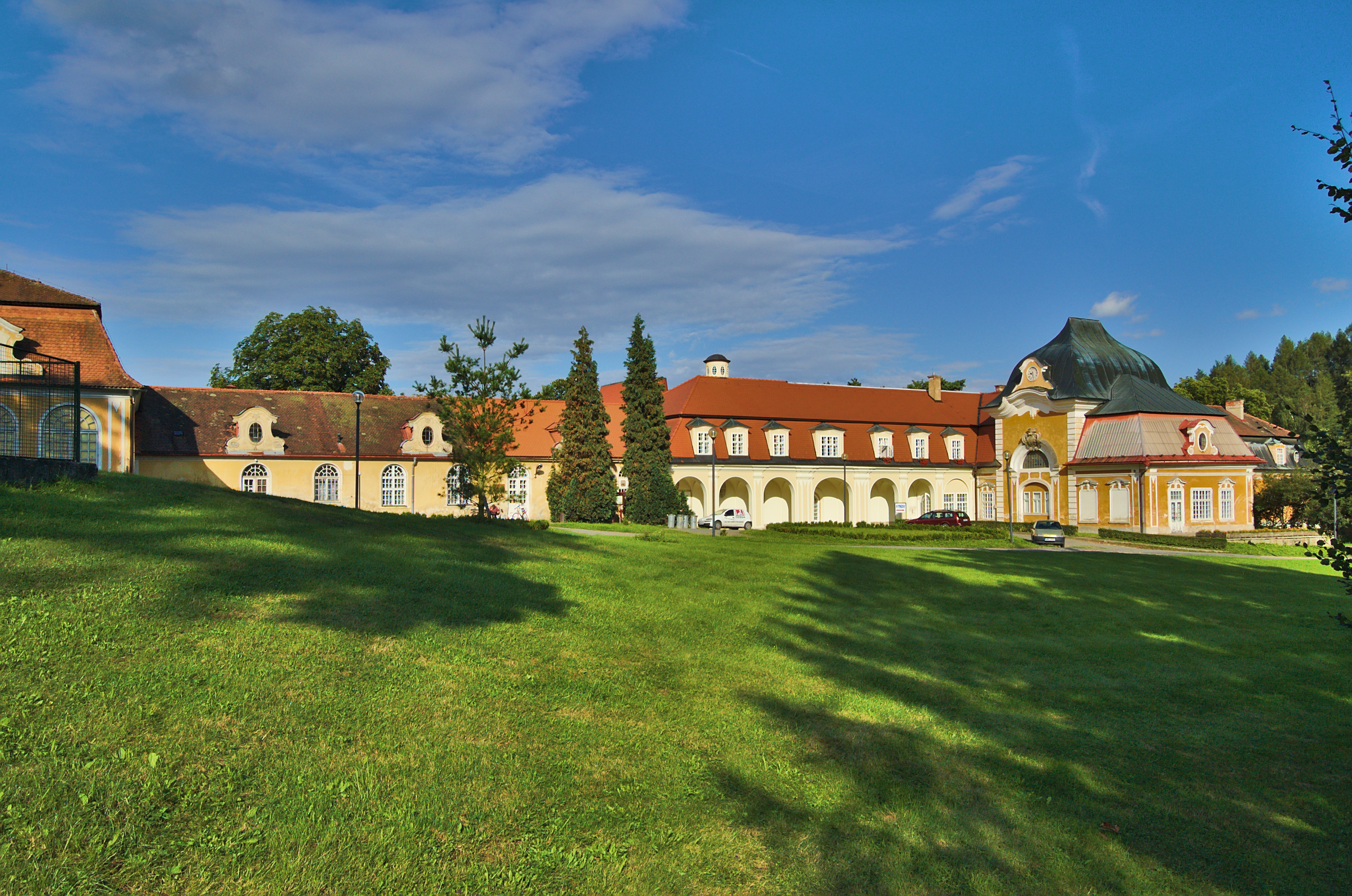 Zámek Velké Opatovice, okres Blansko